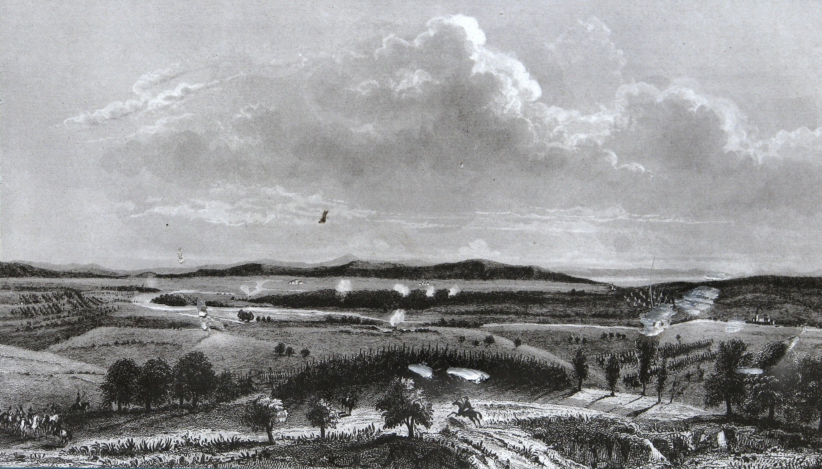 Zweite Schlacht von Zürich an der Limmat bei Dietikon: Stich nach einem Aquarell von Siméon Fort (1793-1861).